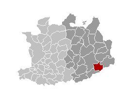 Meerhout locatie